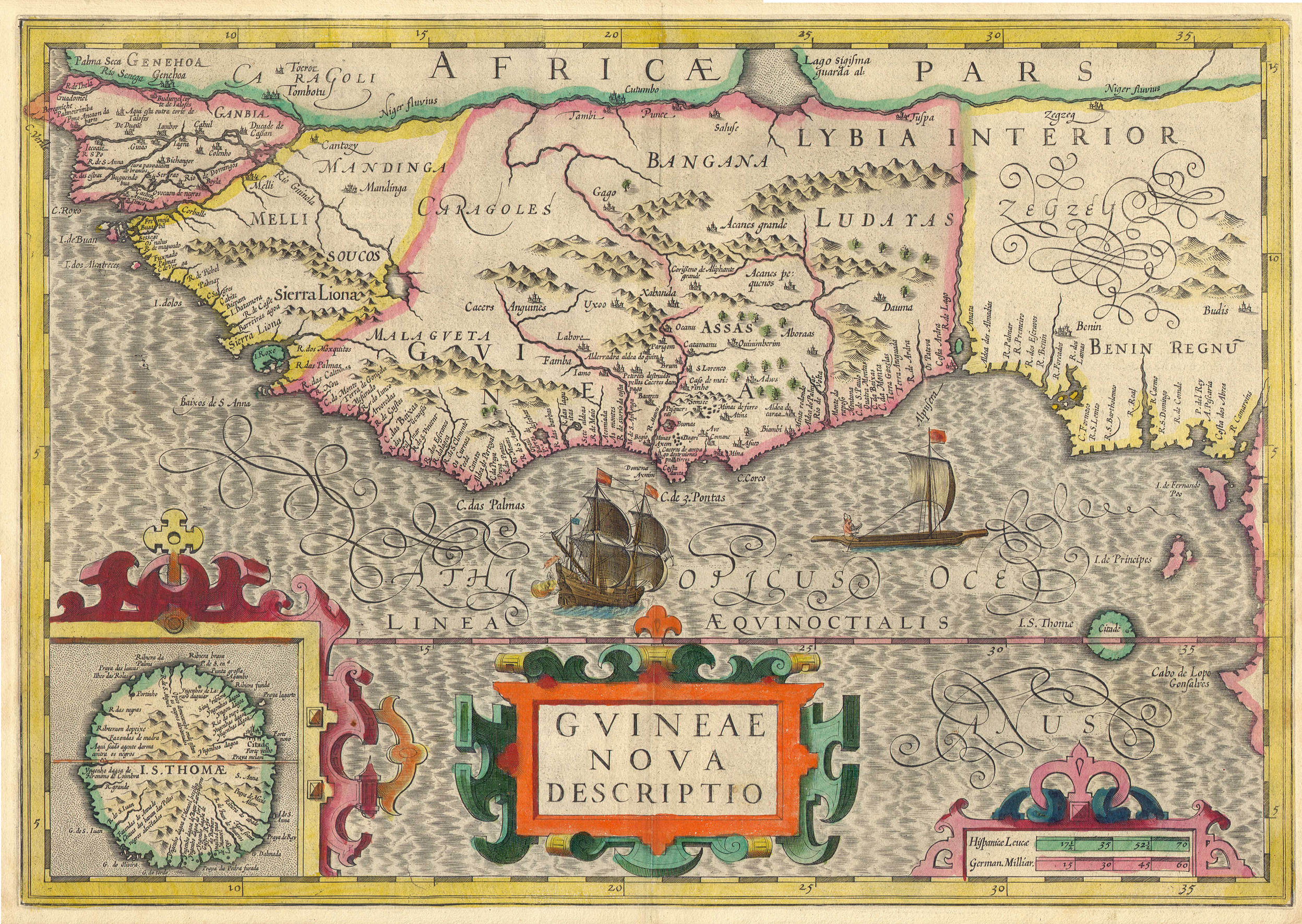 Guineae Nova Descriptio Size=34,6x49,7cm